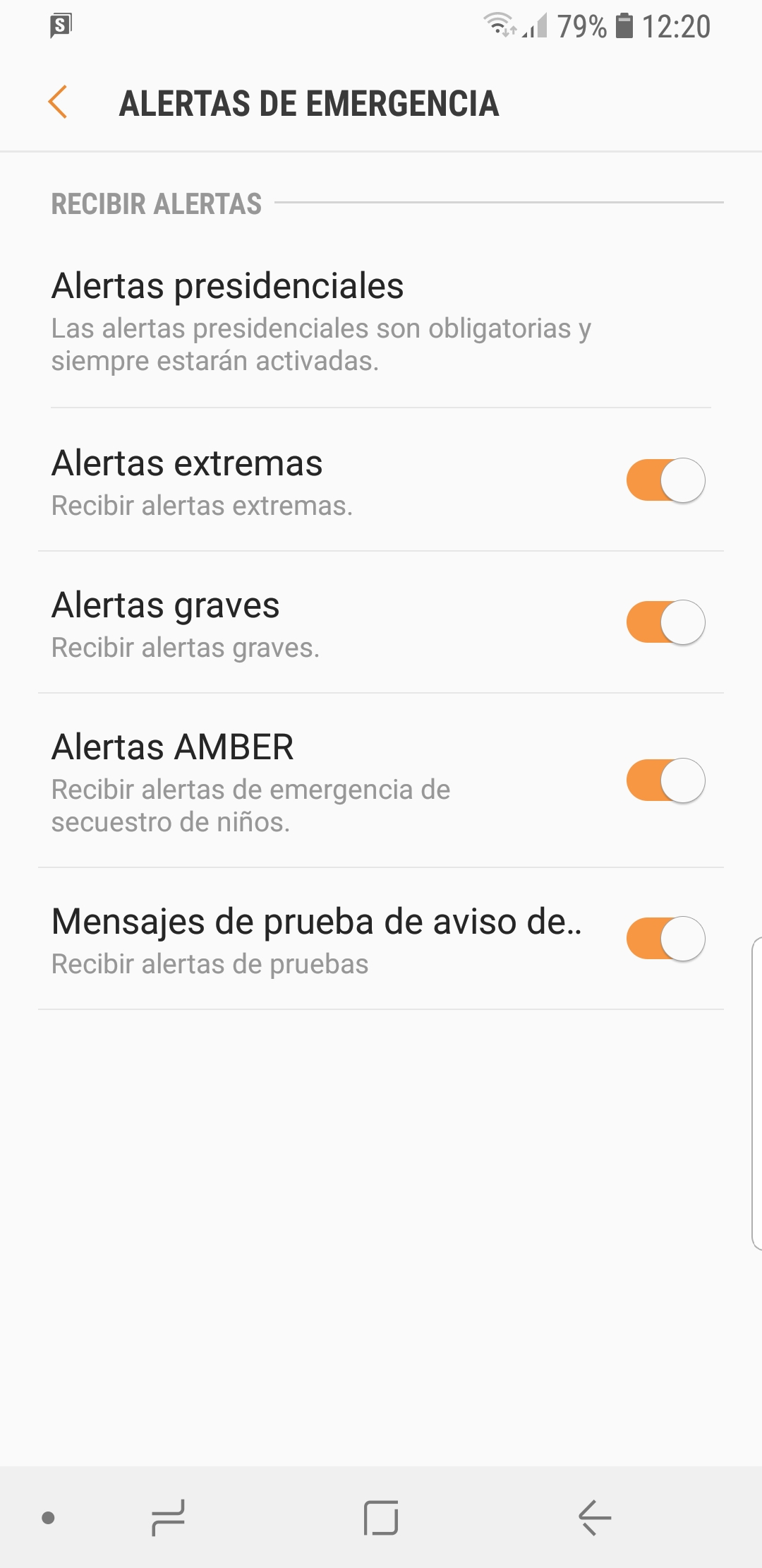 Cell Broadcast espagnol